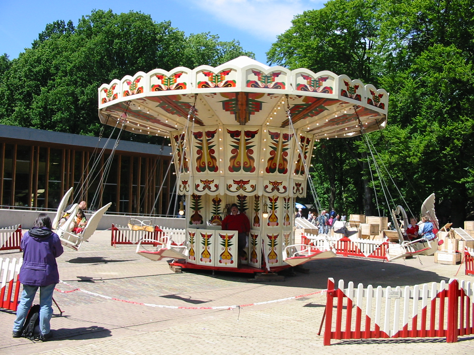 Zweefmolen voor kleinere kinderen in het Openluchtmuseum te Arnhem op zondag 4 juni 2006. Fotograaf: J.A.C. de Kroon.